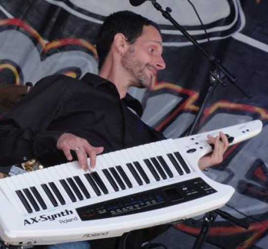 Michaël Cavalier sur scène avec Keytar